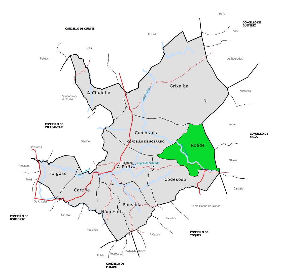 Mapa da parroquia de Roade no concello de Sobrado (Galiza).